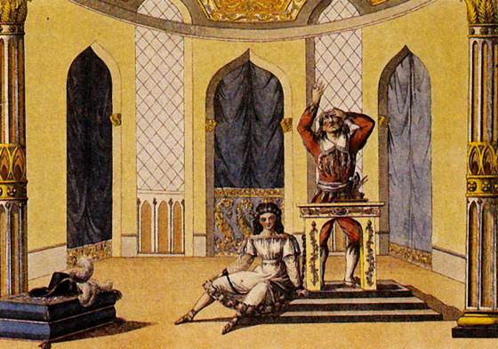 Die gefesselte Phantasie kann dem Harfinisten Nachtigall nicht helfen ein Preisgedicht zu verfassen.[1]